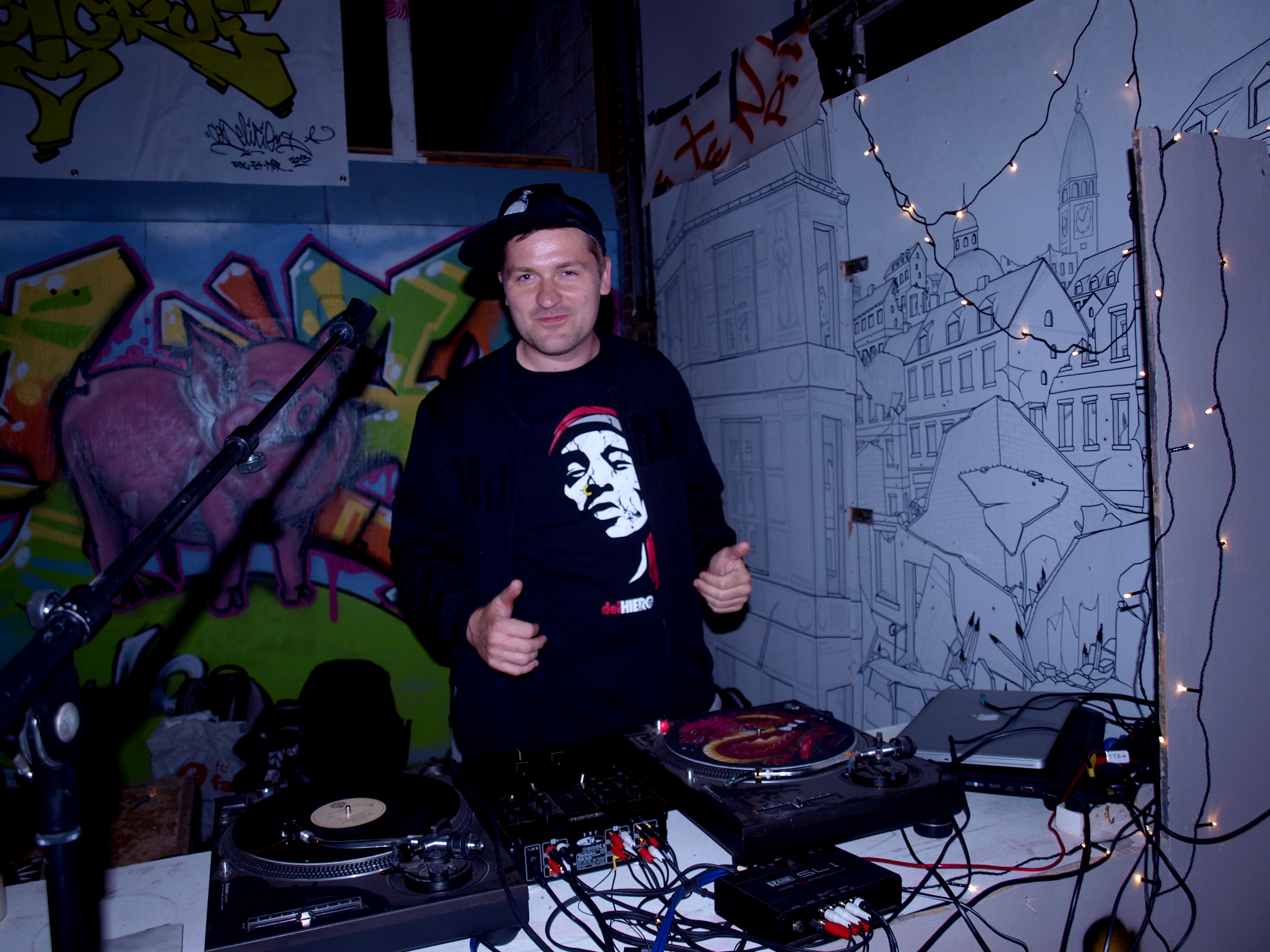 Supajan den 18. juli 2015 under koncert ved Kulturlogen i Kolding